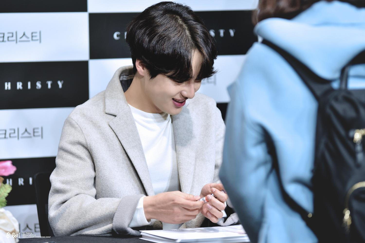 20171216 양세종 크리스크리스티 팬사인회